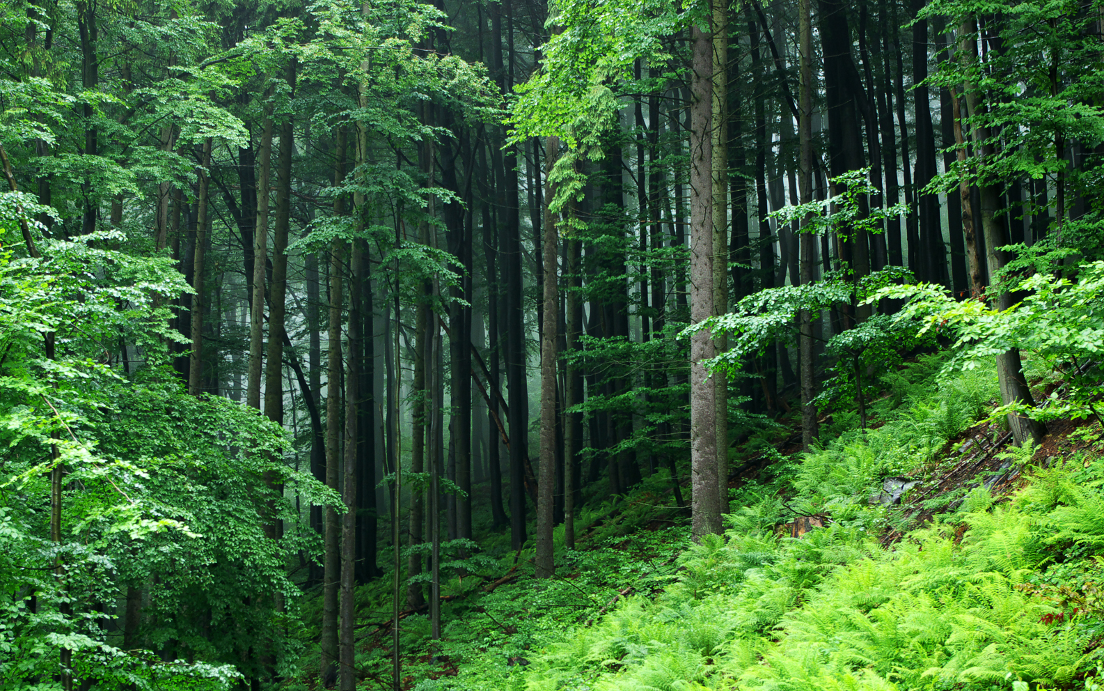 Lasy bukowo świerkowe na Równicy w Beskidzie Śląskim